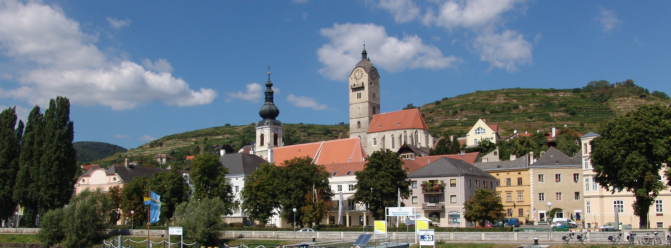 Krems an der Donau, selbst von der Donau aus fotografiert